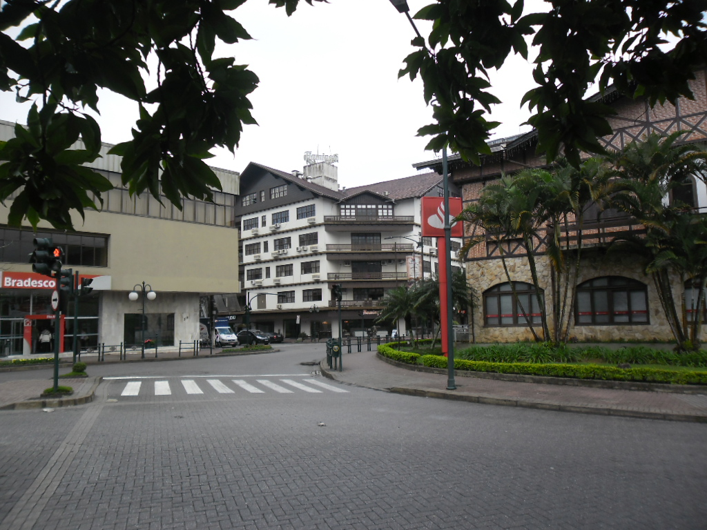 xv de novembro